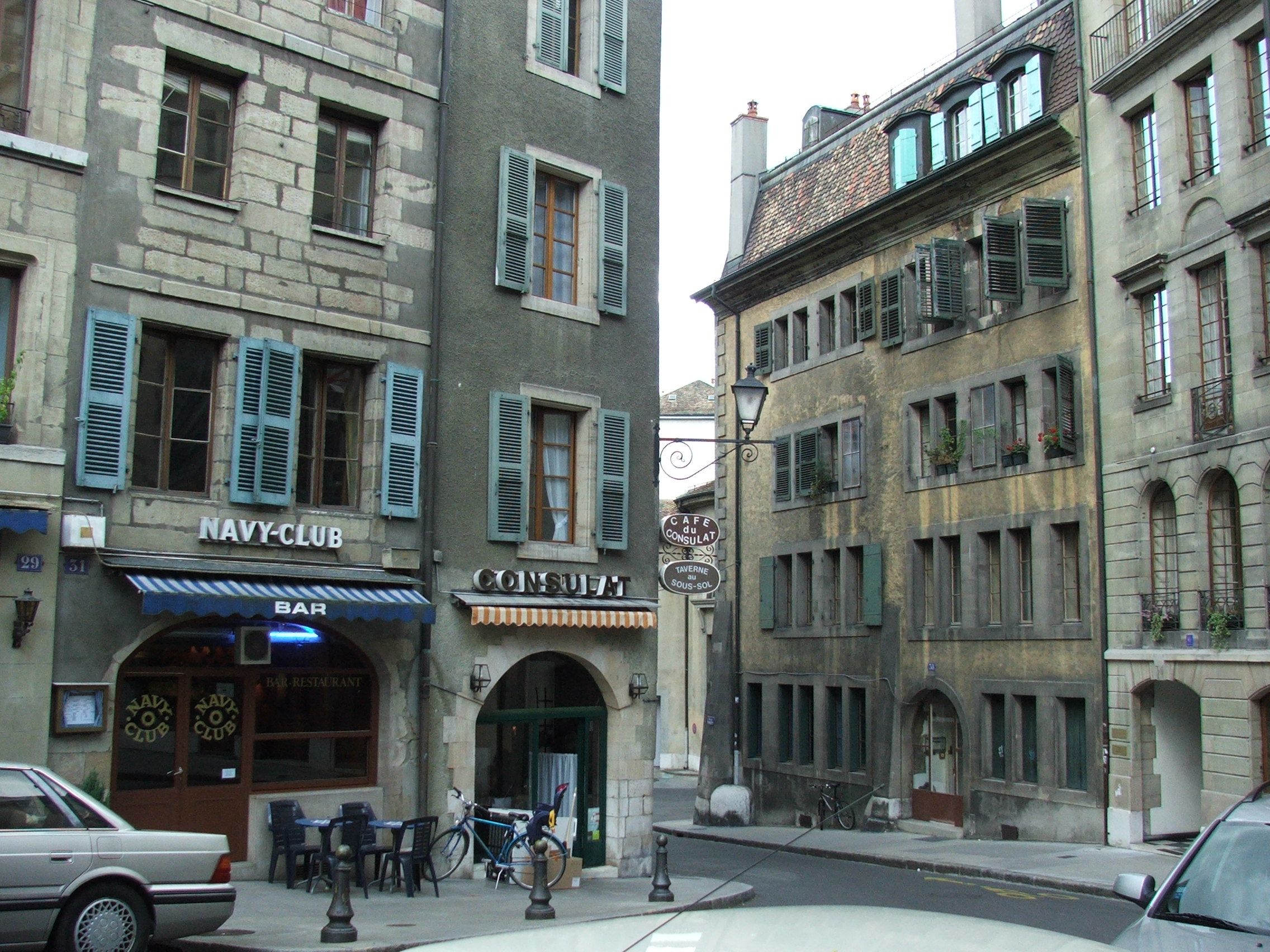 Place du Bourg-de-Four de Genève (Suisse)